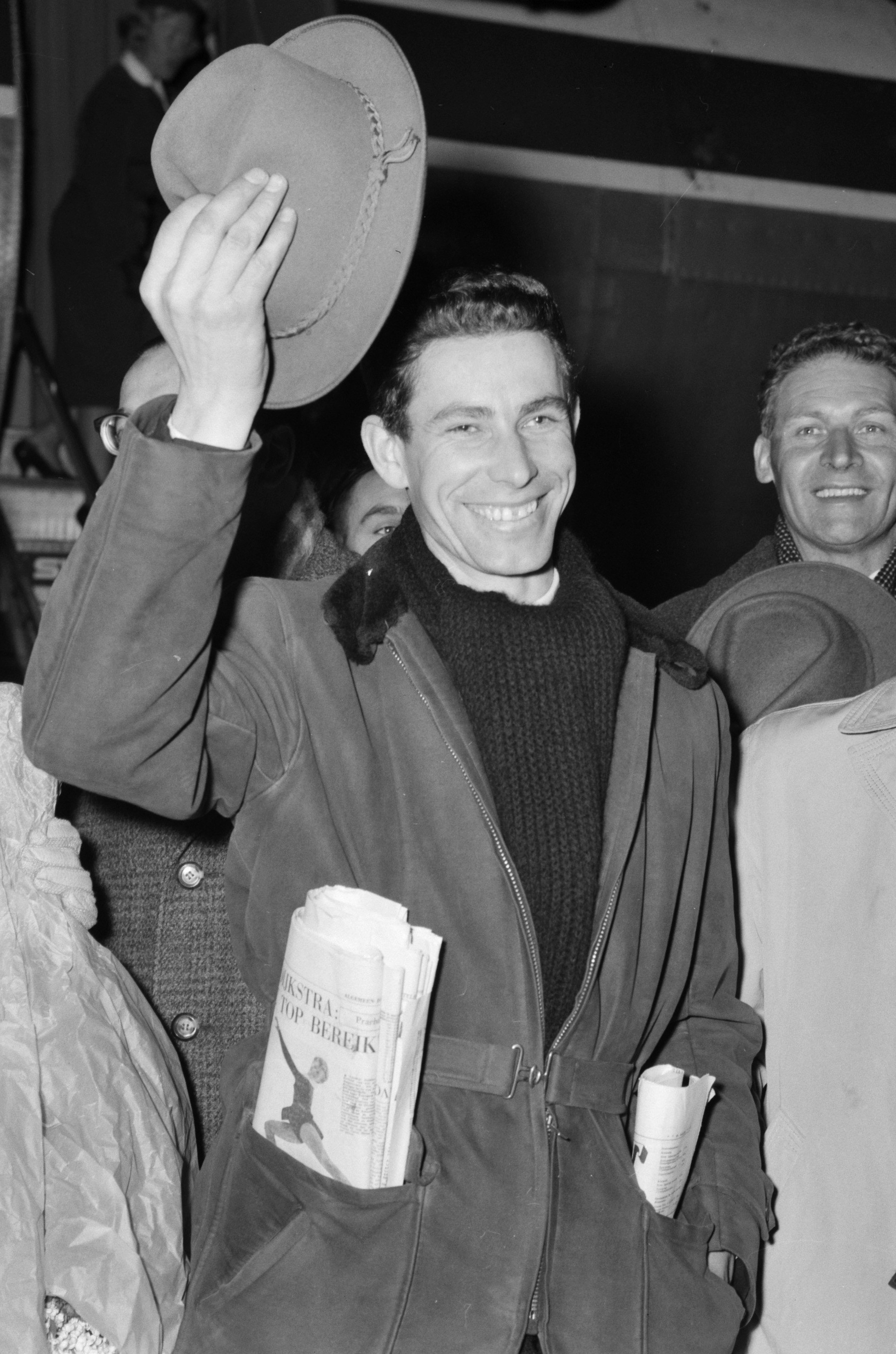 Aankomst Jan Pesman op Schiphol, Jan Pesman op het platform